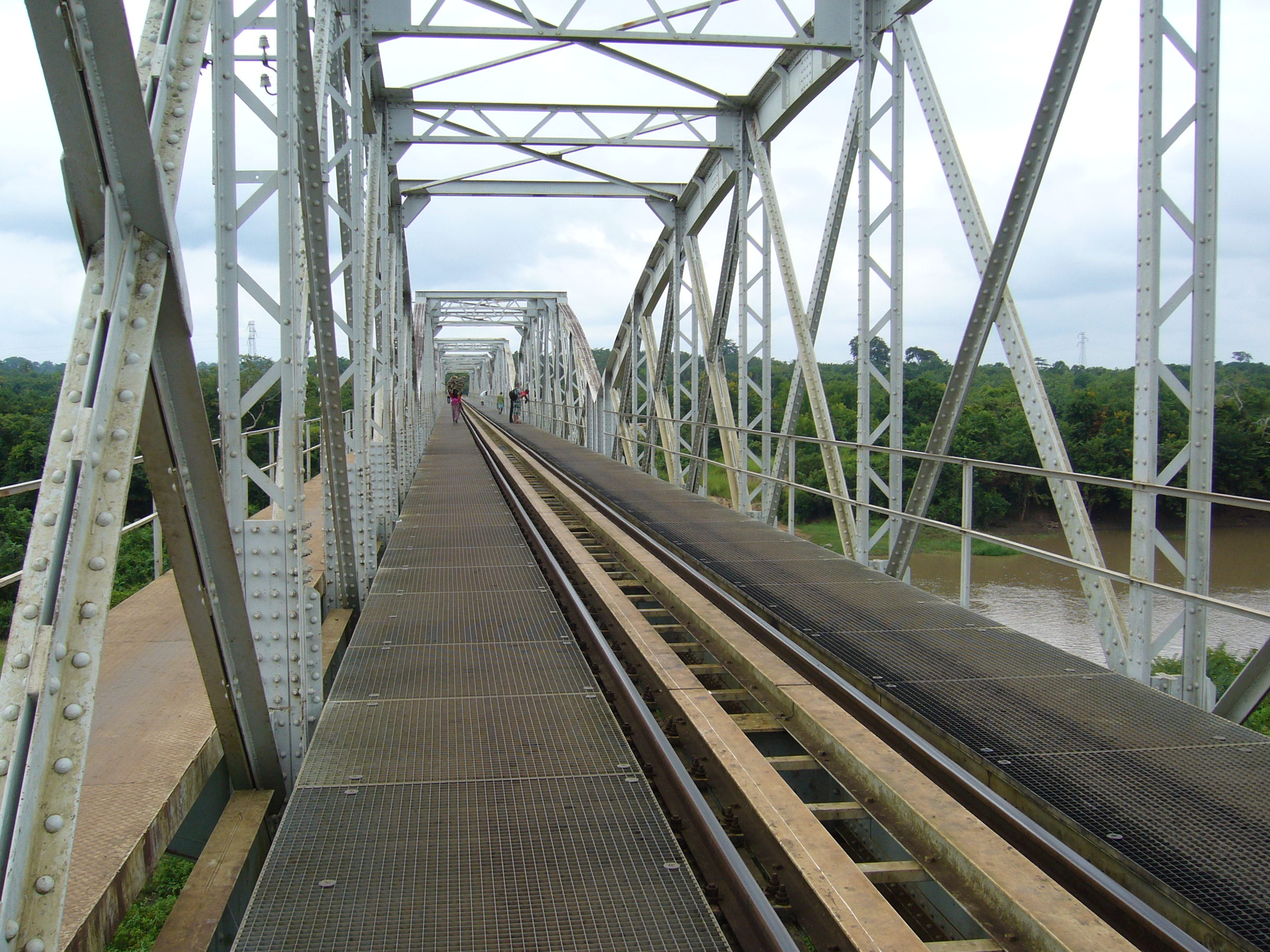 Pont colonial créé de puis 1910, abritant le chemin de fer